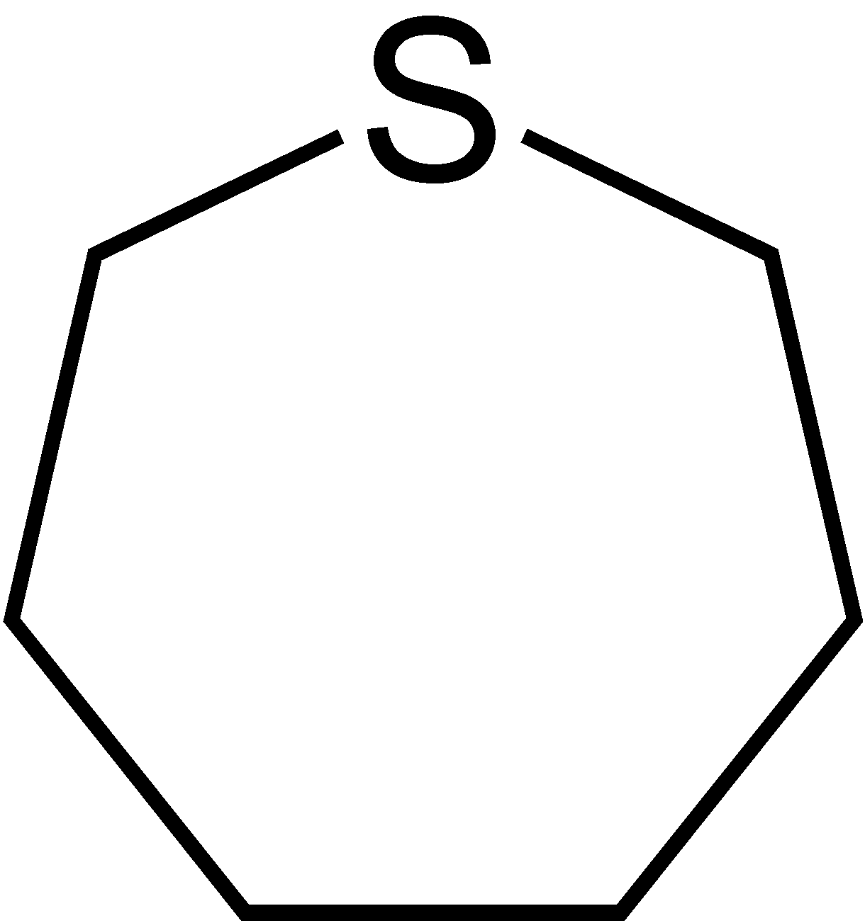 Struktur von Thiepan